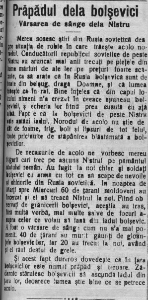 Матеріали друкованої преси науково-довідкової бібліотеки державного архіву Чернівецької області, які висвітлюють події Голодомору на Україні 1932 – 1933 років.